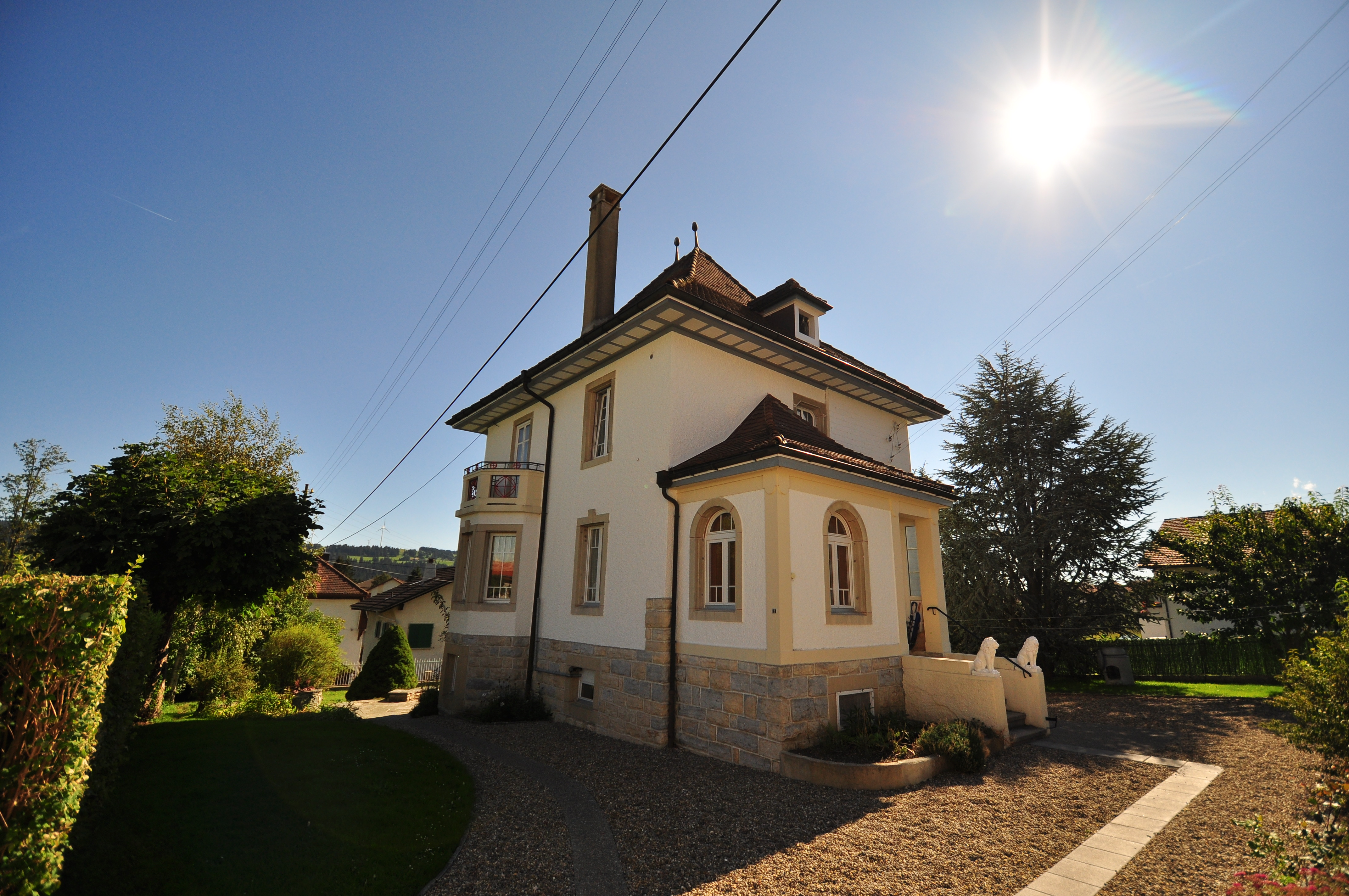 Les Breuleux Ferme 2